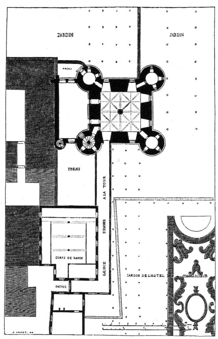 Plan du rez-de-chaussée de la grosse tour du Temple, en 1793, facsimilierter Stich